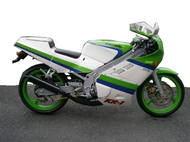 MotoBike is KR-1 Green Color